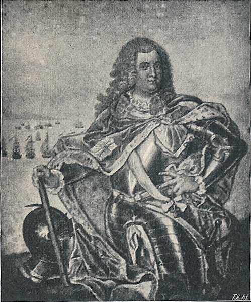 Christian Carl Gabel 1679-1748. Viceadmiral og stiftamtmand.